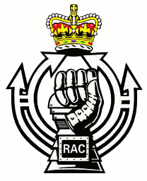 RAC Badge